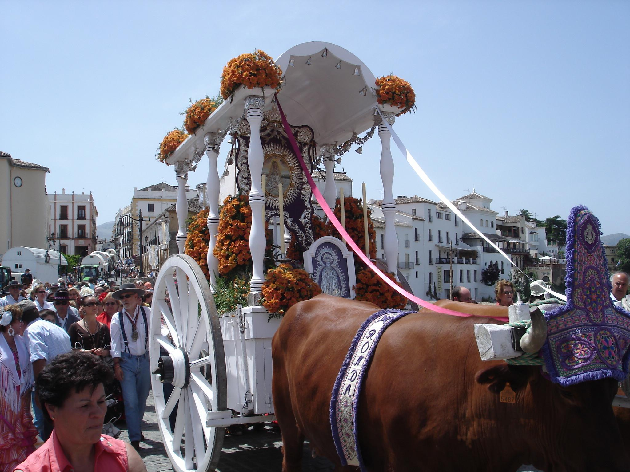 Fête religieuse dans la ville de Ronda (Andalousie) le 25 juin 2006. Auteur : Jean-Claude Perez